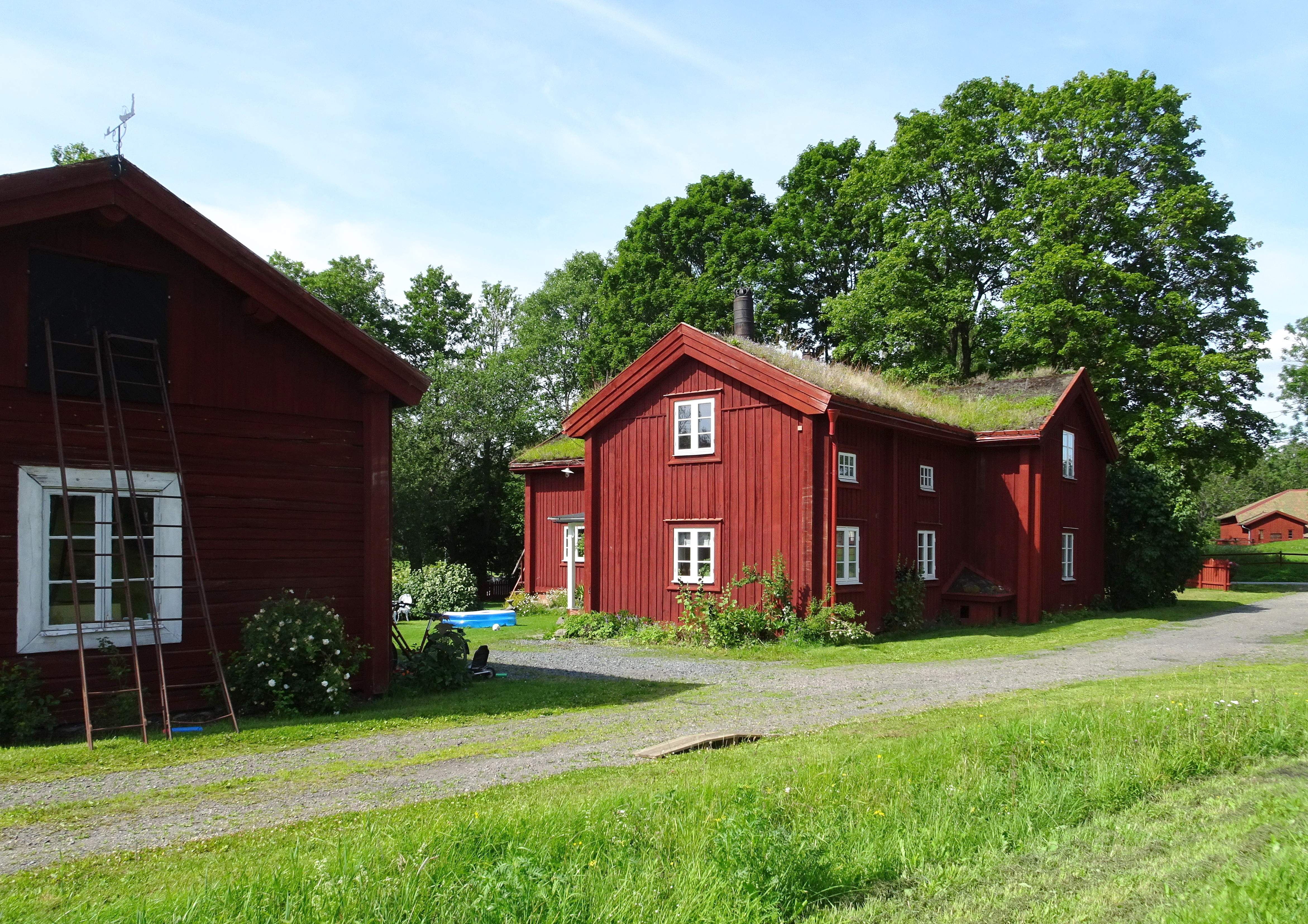 Svensastugan i Pershyttan